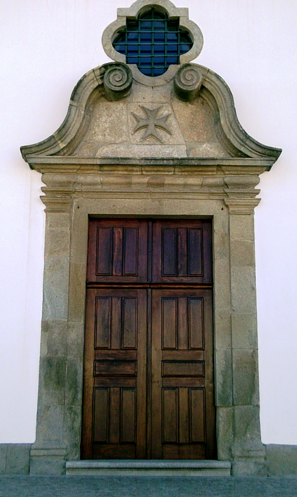 Igreja Paroquial de São Martinho do Bispo, freguesia de Arada, concelho de Ovar, distrito de Aveiro, Portugal: portada.